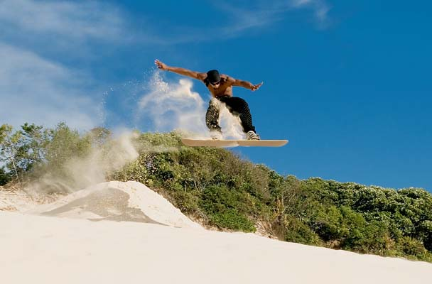 A Sandboarder does a jump in Florianópolis dunes.